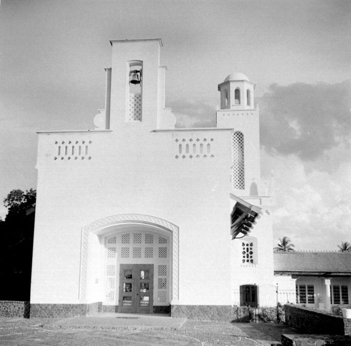 Negatief. Kapel en koepeltoren van Menteng Poelau te Jakarta, Java